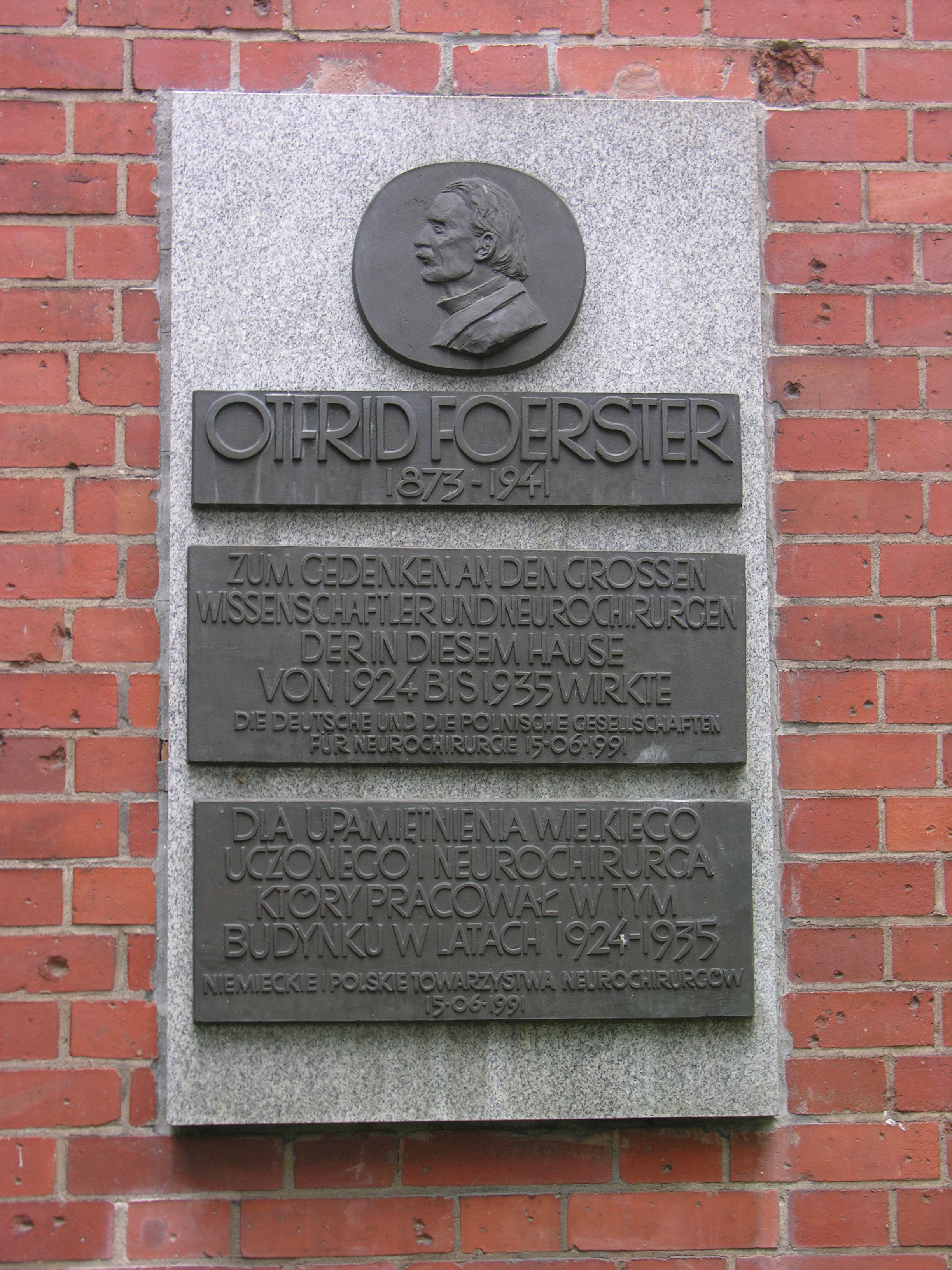 Tablica pamiątkowa ku czci Otfrida Foerstera - Wrocław, ul. Komandorska 118-120.